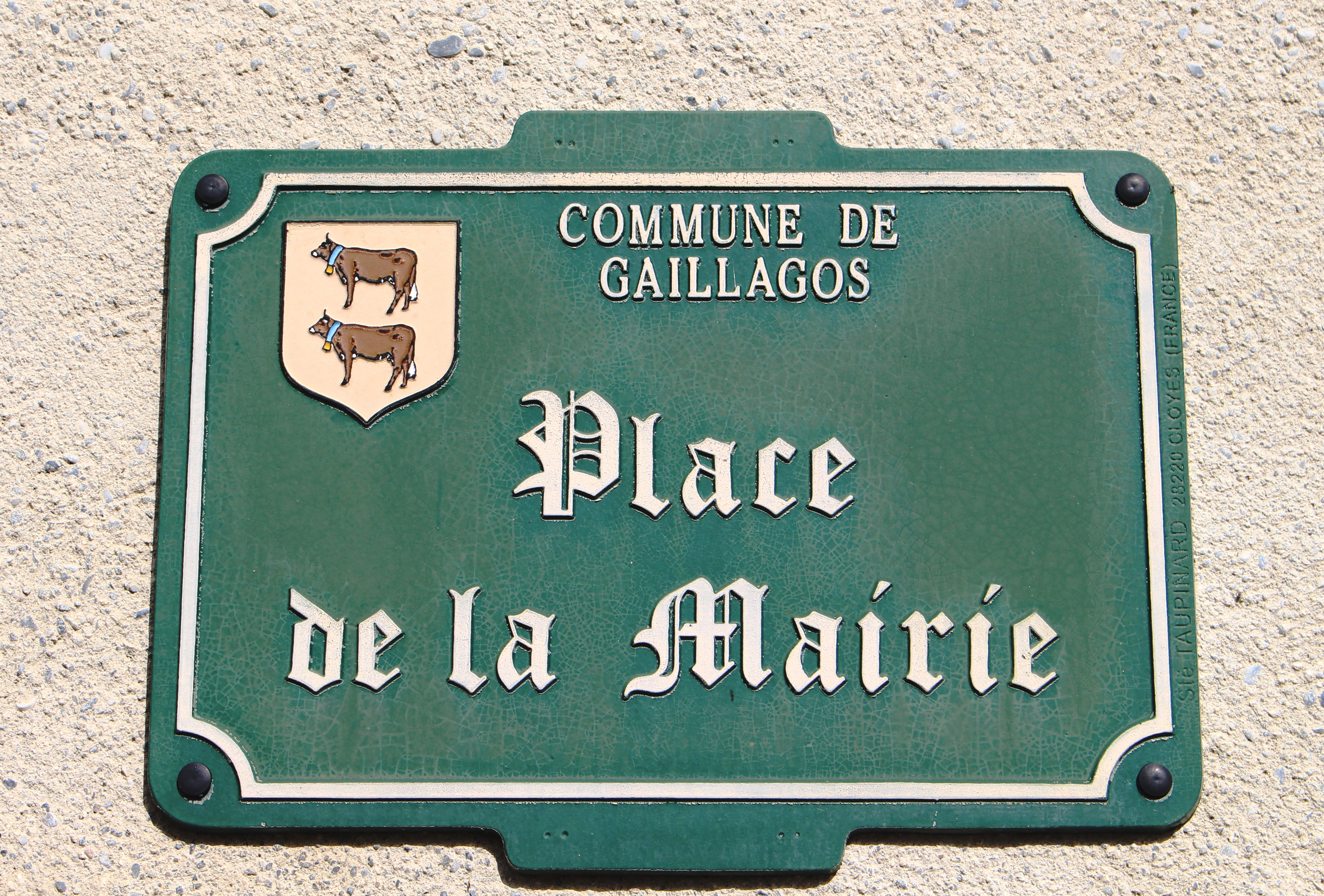 Rue du village de Gaillagos (Hautes-Pyrénées)